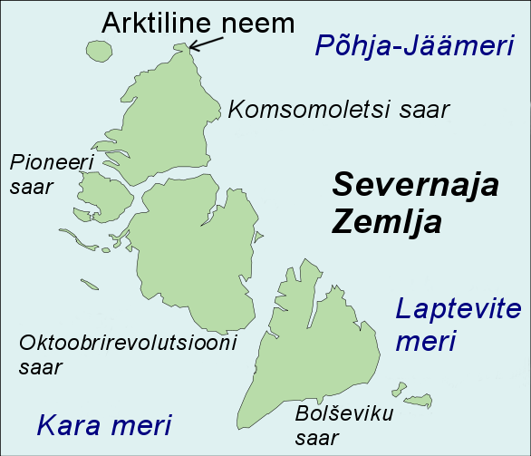 Arktiline neeme asukoht